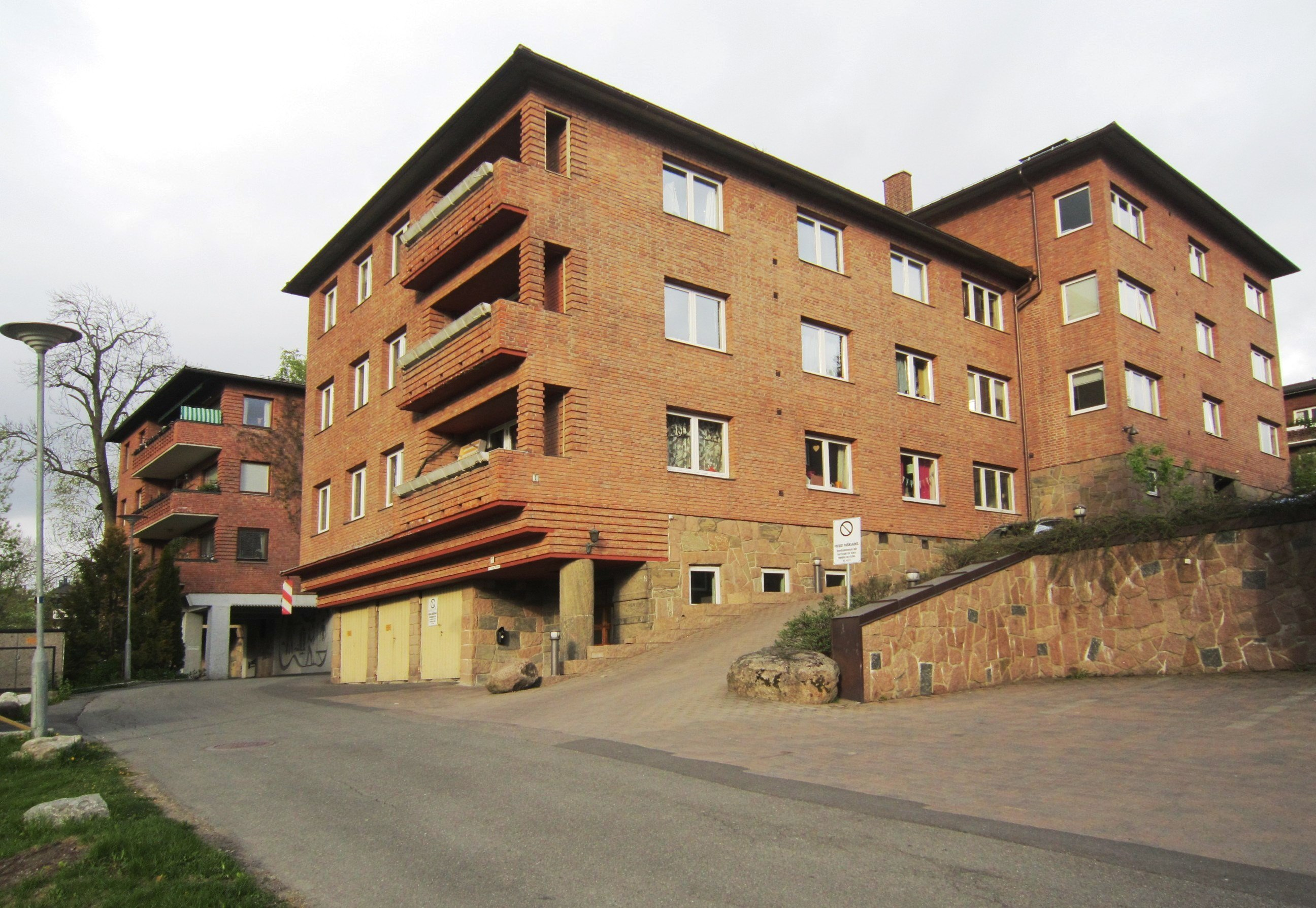 Ingar Nilsens vei på Skøyen i Oslo. Huset nærmest er nr. 1 (A og B, arkitekter: Torp & Torp, 1939) og det bakenfor nr. 3.